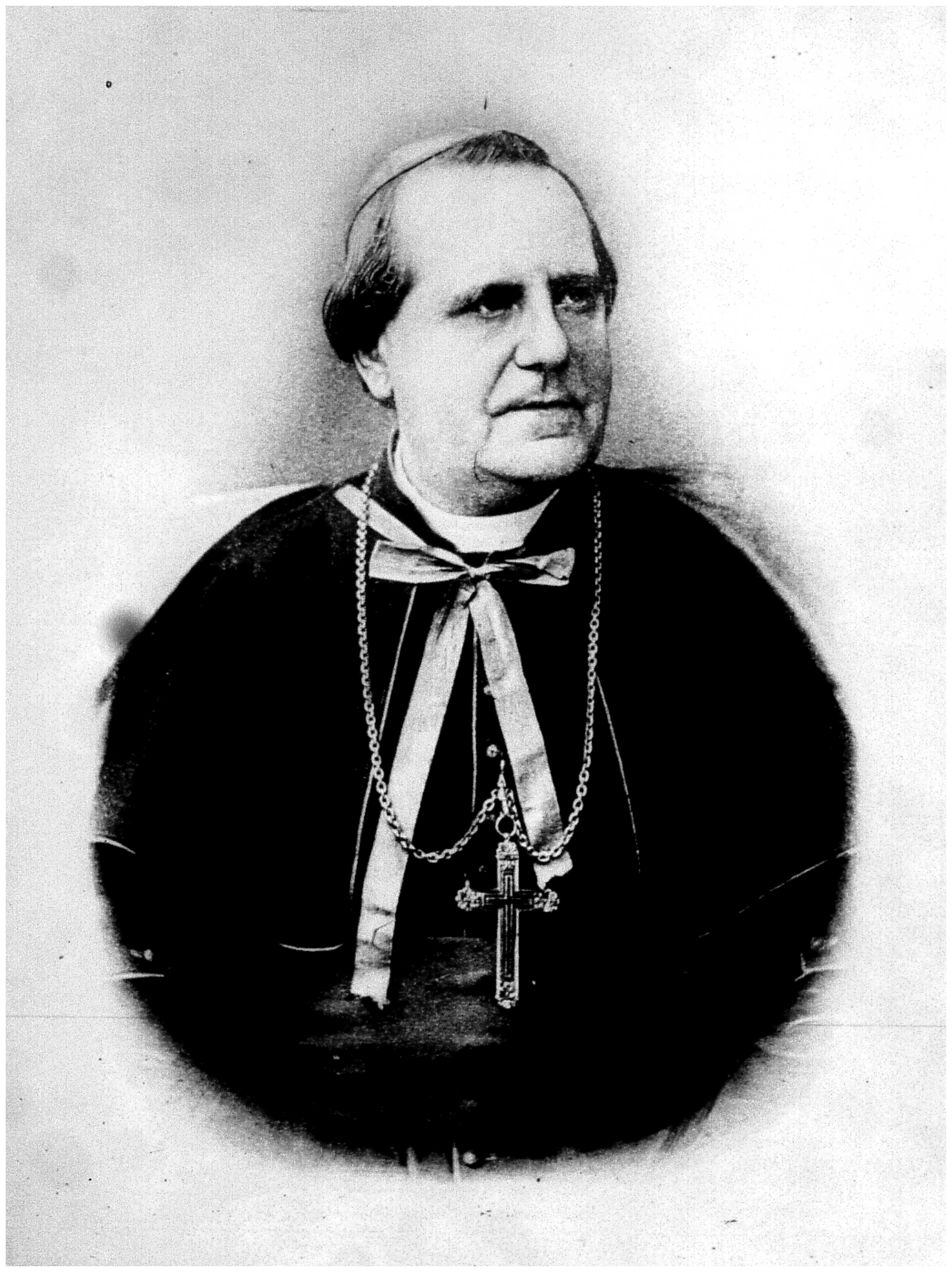 image issue du microfilm 96.